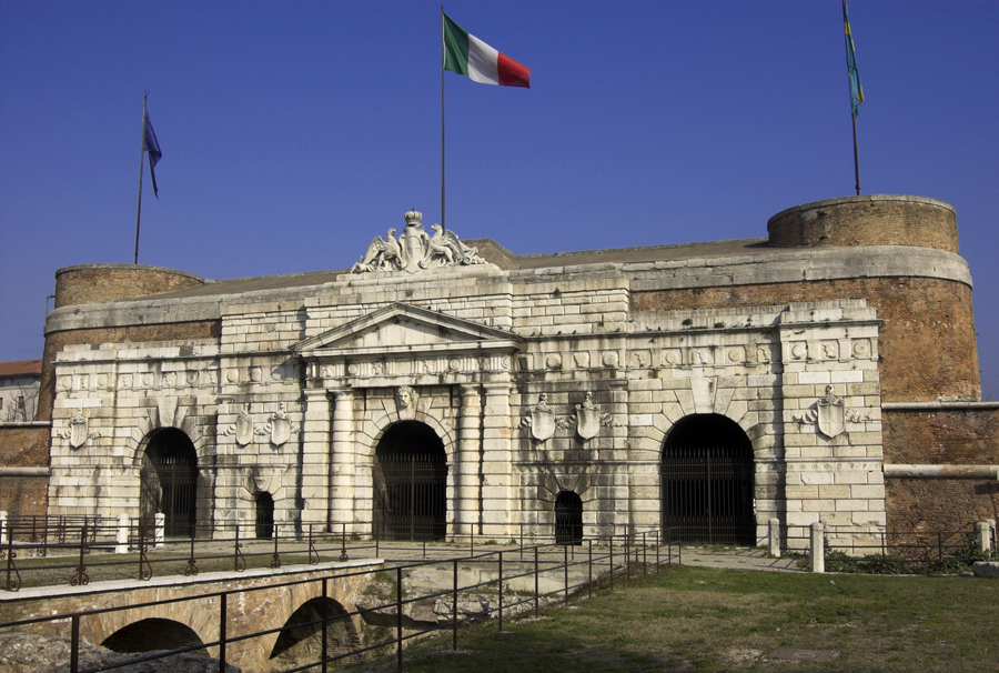 Porta Nuova a Verona vista dall'esterno